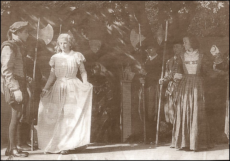 Friluftsspil i Fensmark Præstegård i anledning af Christian Winthers 150 års fødselsdag i 1946